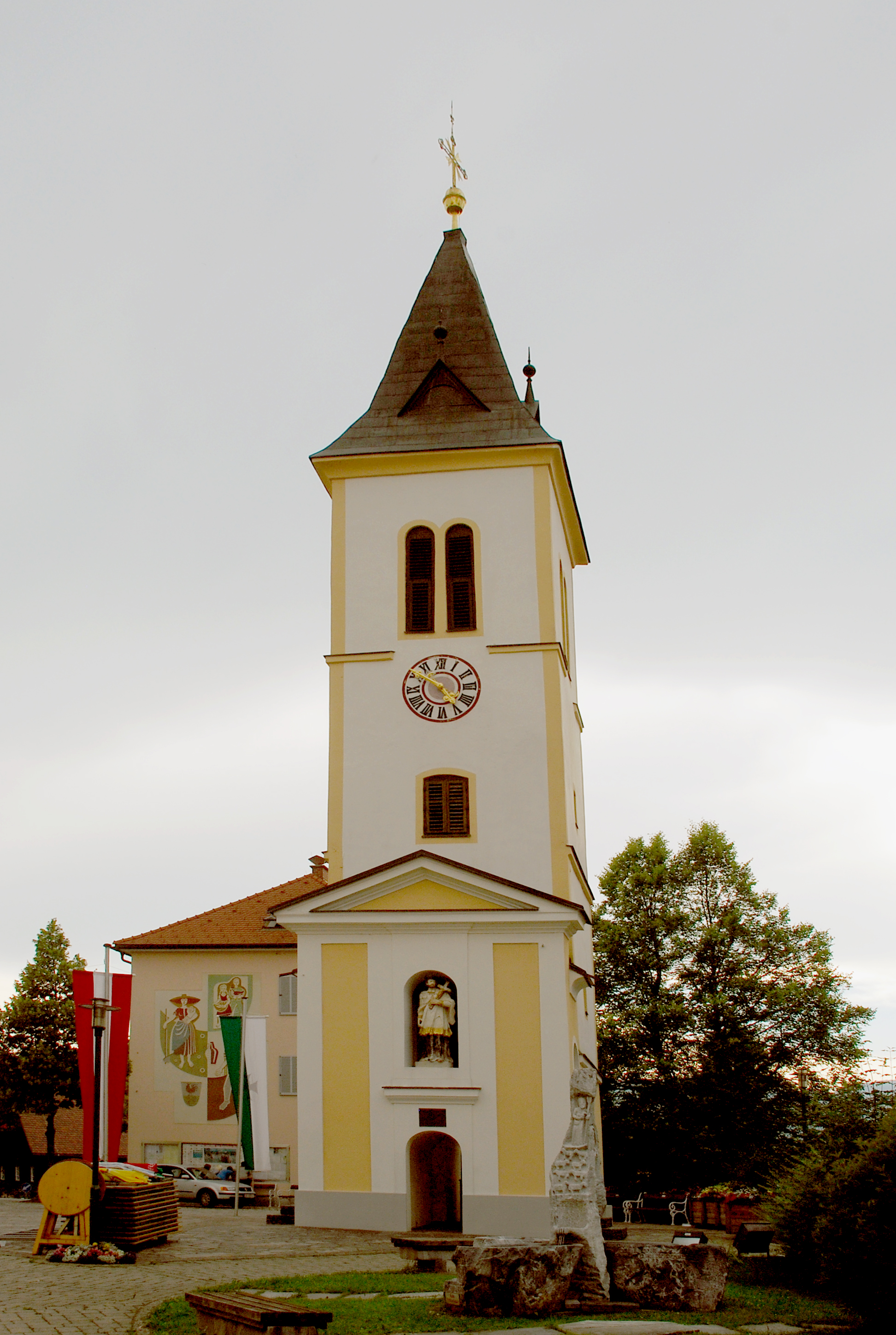 St Peter im Sulmtal, Steiermark, Österreich: Kirchturm